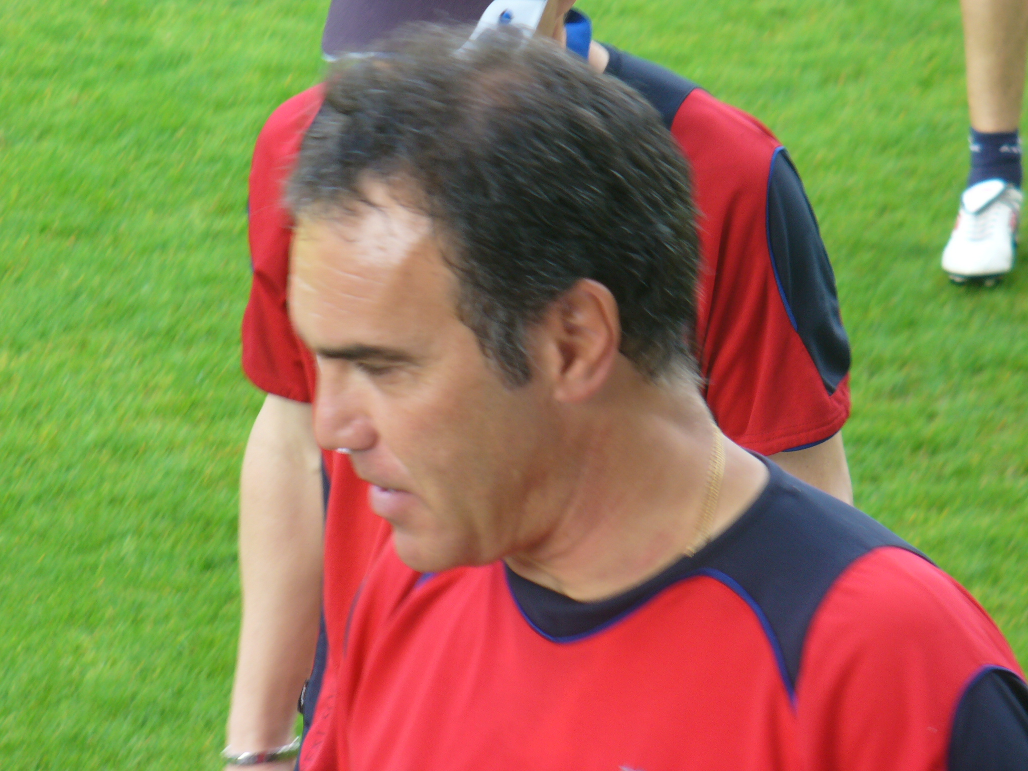 Martín Lasarte en Zubieta titulos 2013 = SEGUNDO en torneo chileno con la uc